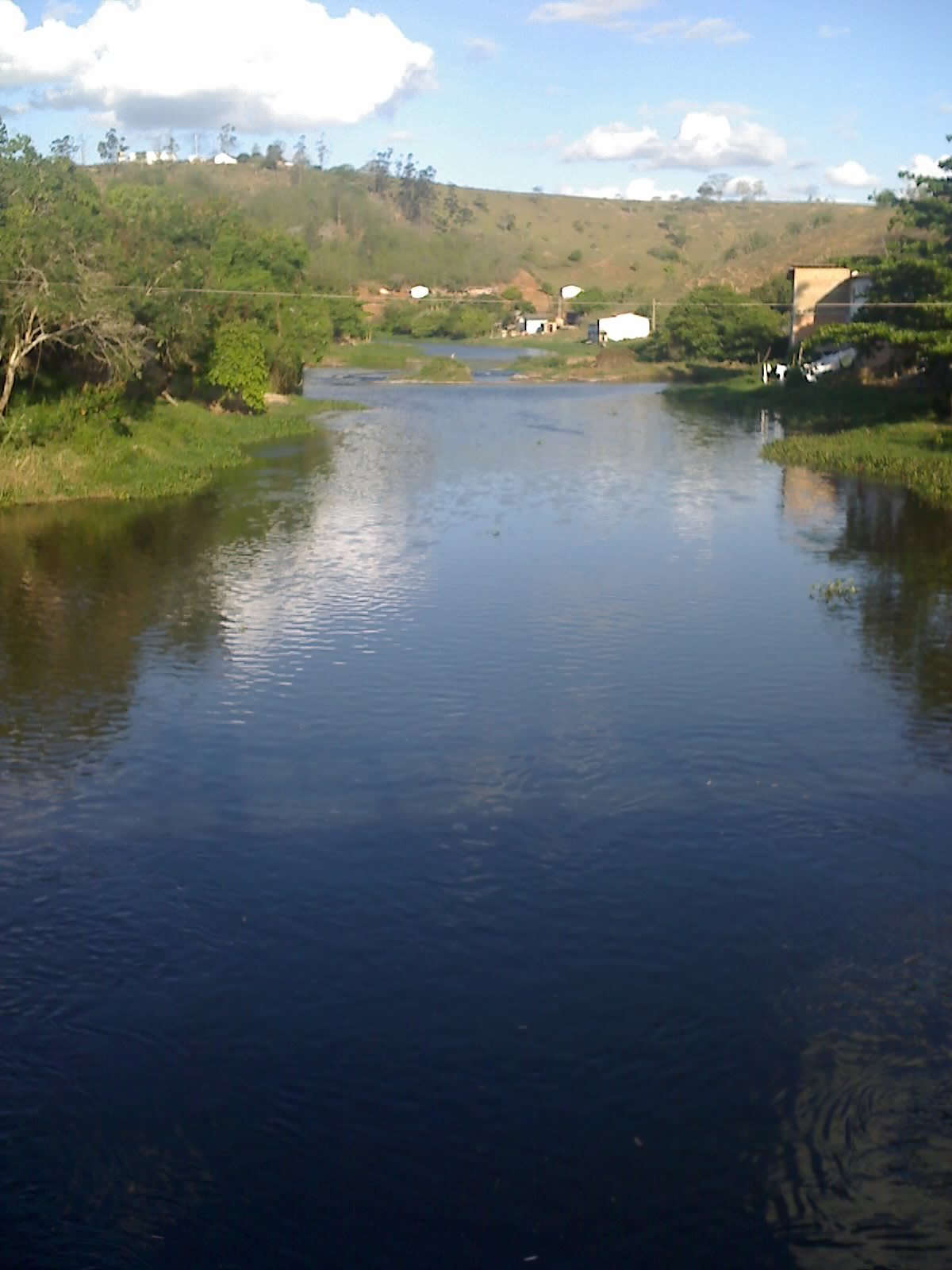 Foto do rio Itanhém